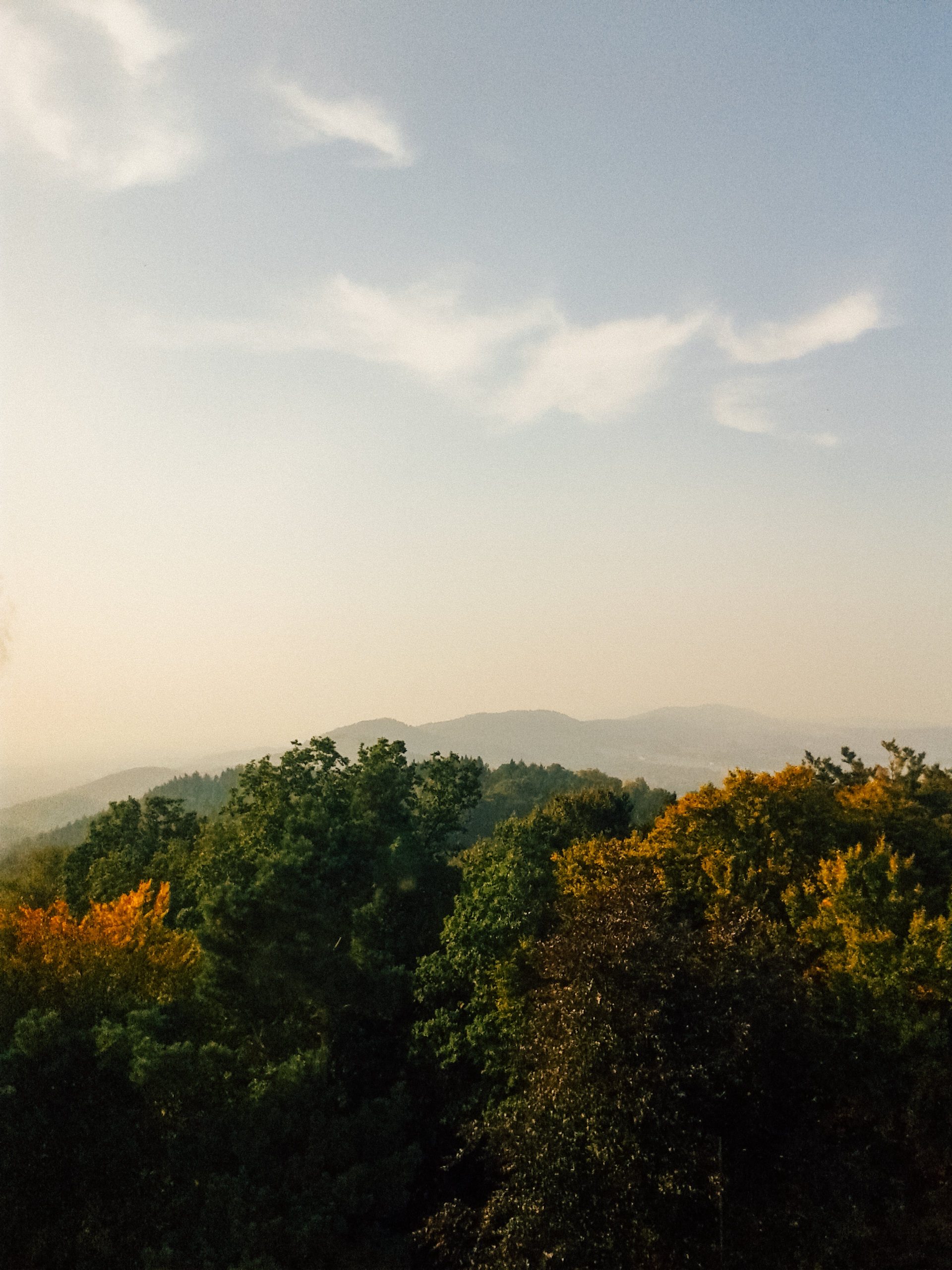 Teutoburger Wald, Teuto